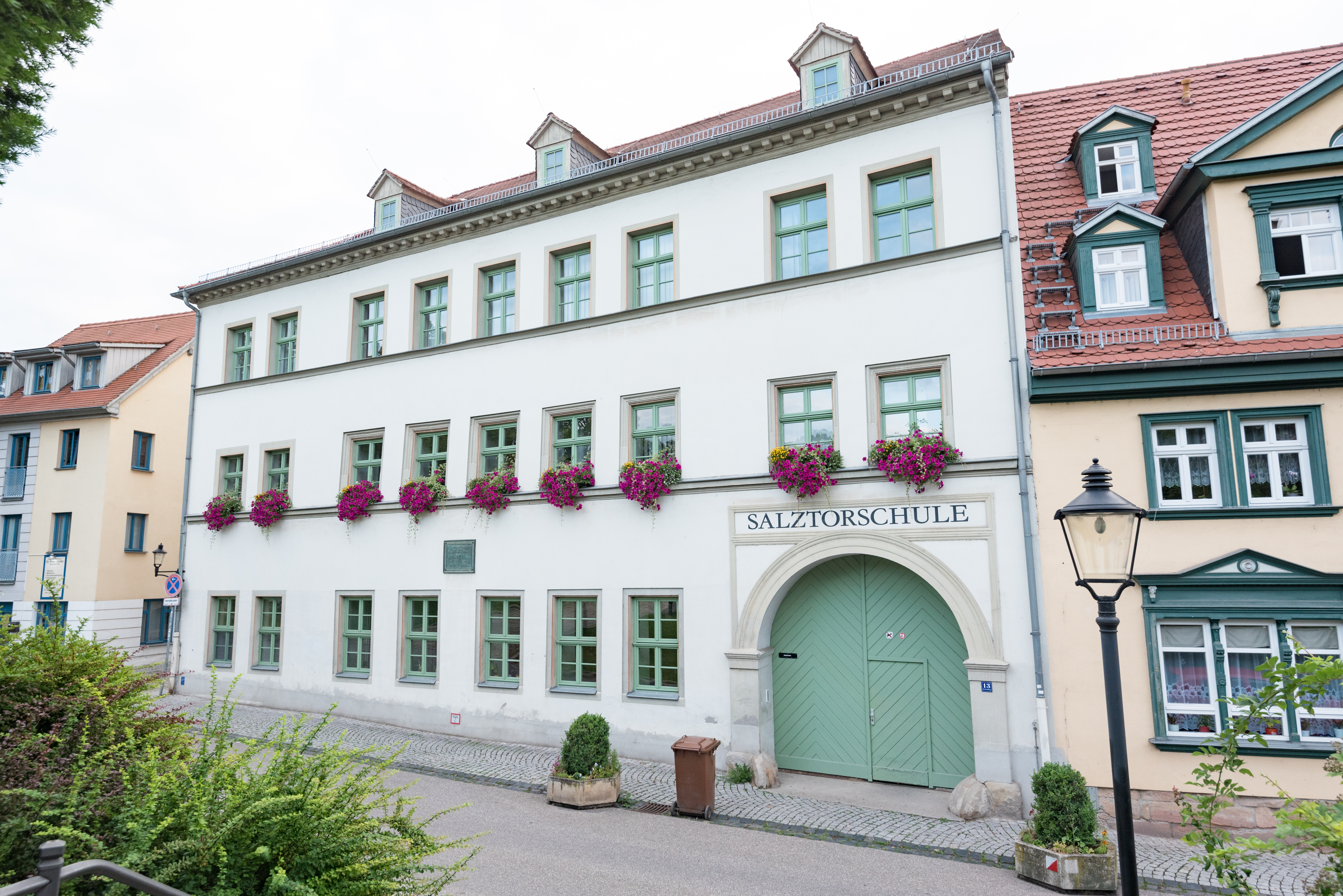 Naumburg (Saale), Kramerplatz 13